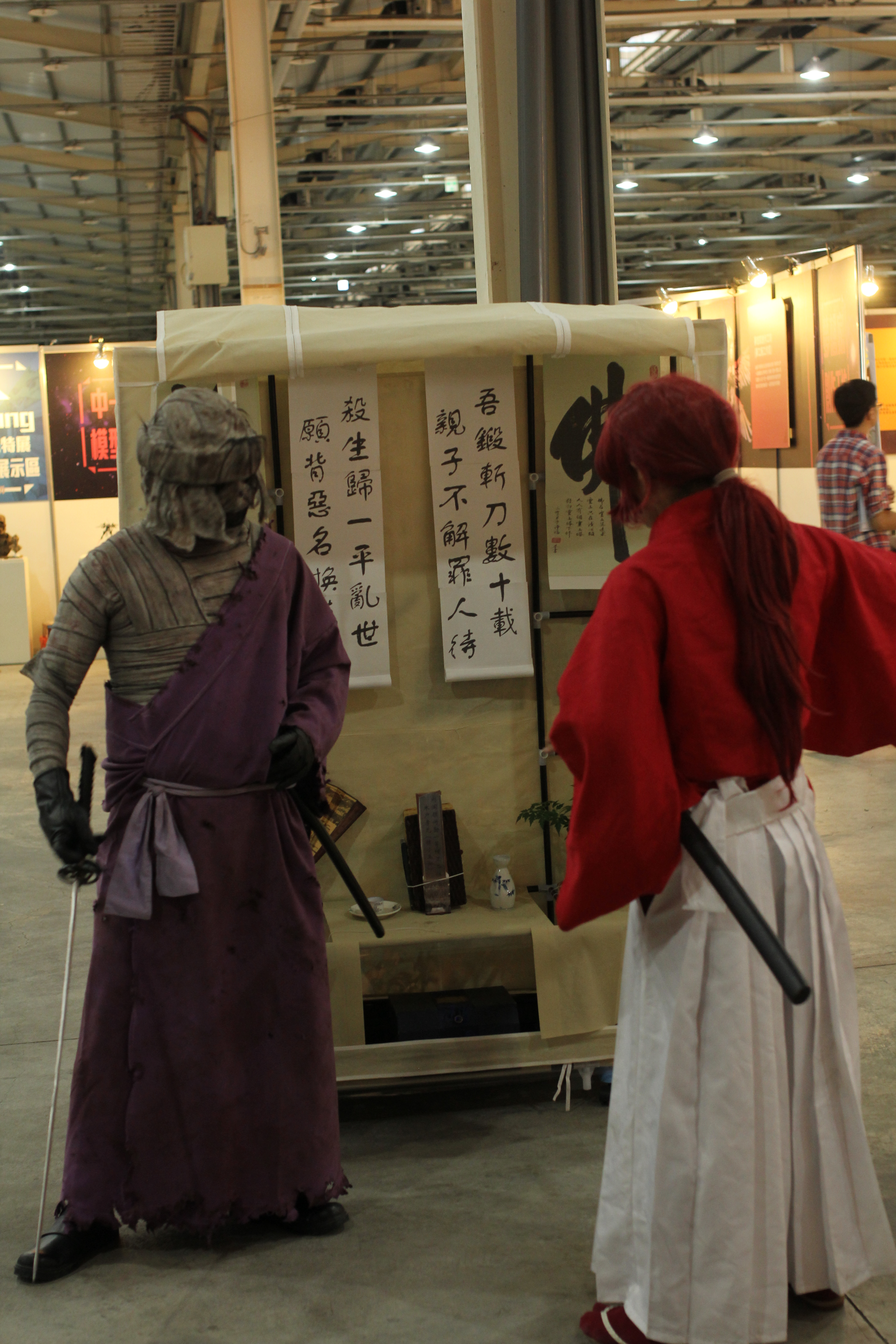 2015臺中動漫力第二日，《神劍闖江湖》志志雄真實、緋村劍心cosplayer。